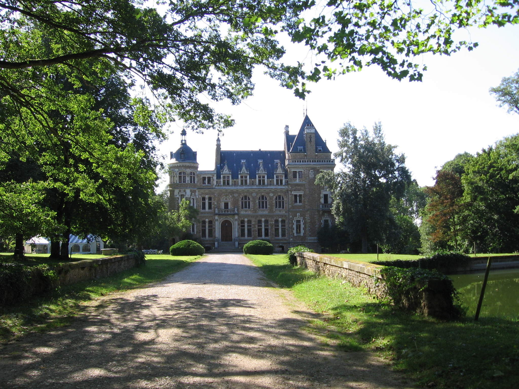 Description: Vue extérieure du Château de Méridon (Chevreuse, France) Auteur: User:MaximePetazzoni